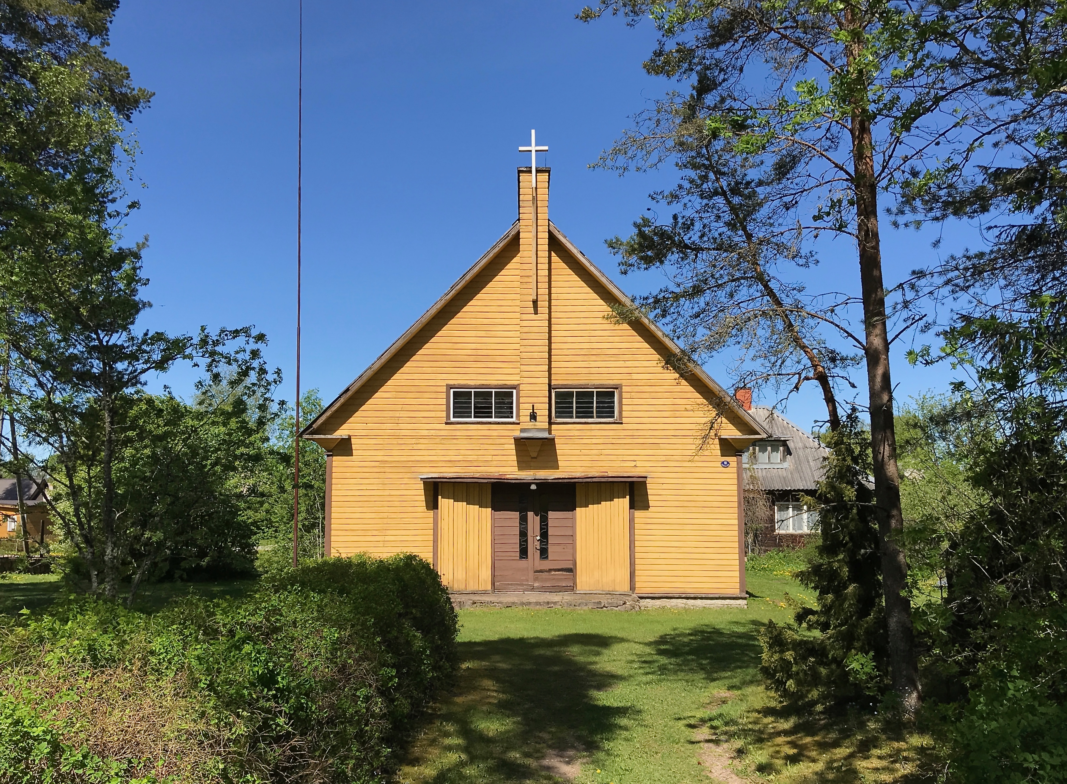 Kuusalu vennastekoguduse palvemaja